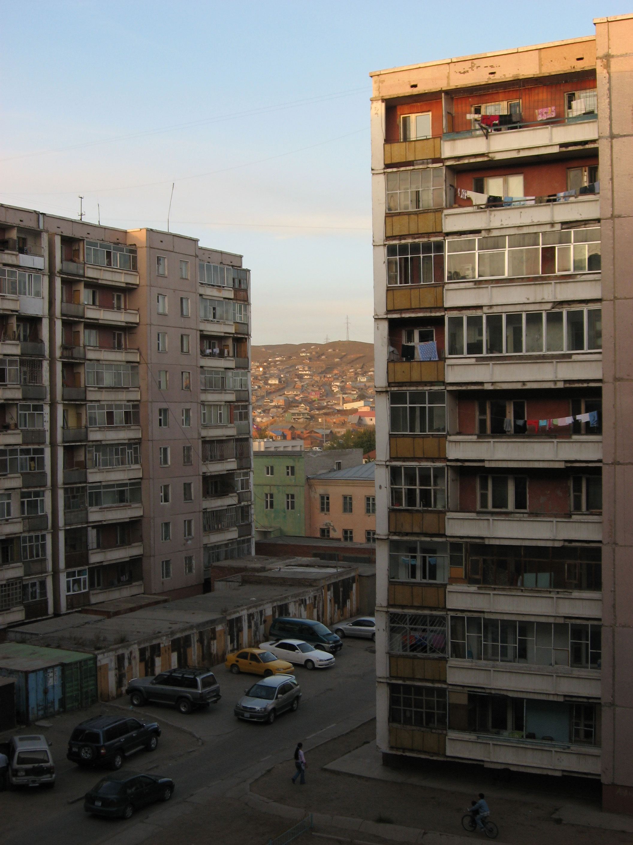 Mass housing in Ulaanbaatar, Sükhbaatar düüreg, 5-r khoroo, Sep. 2007